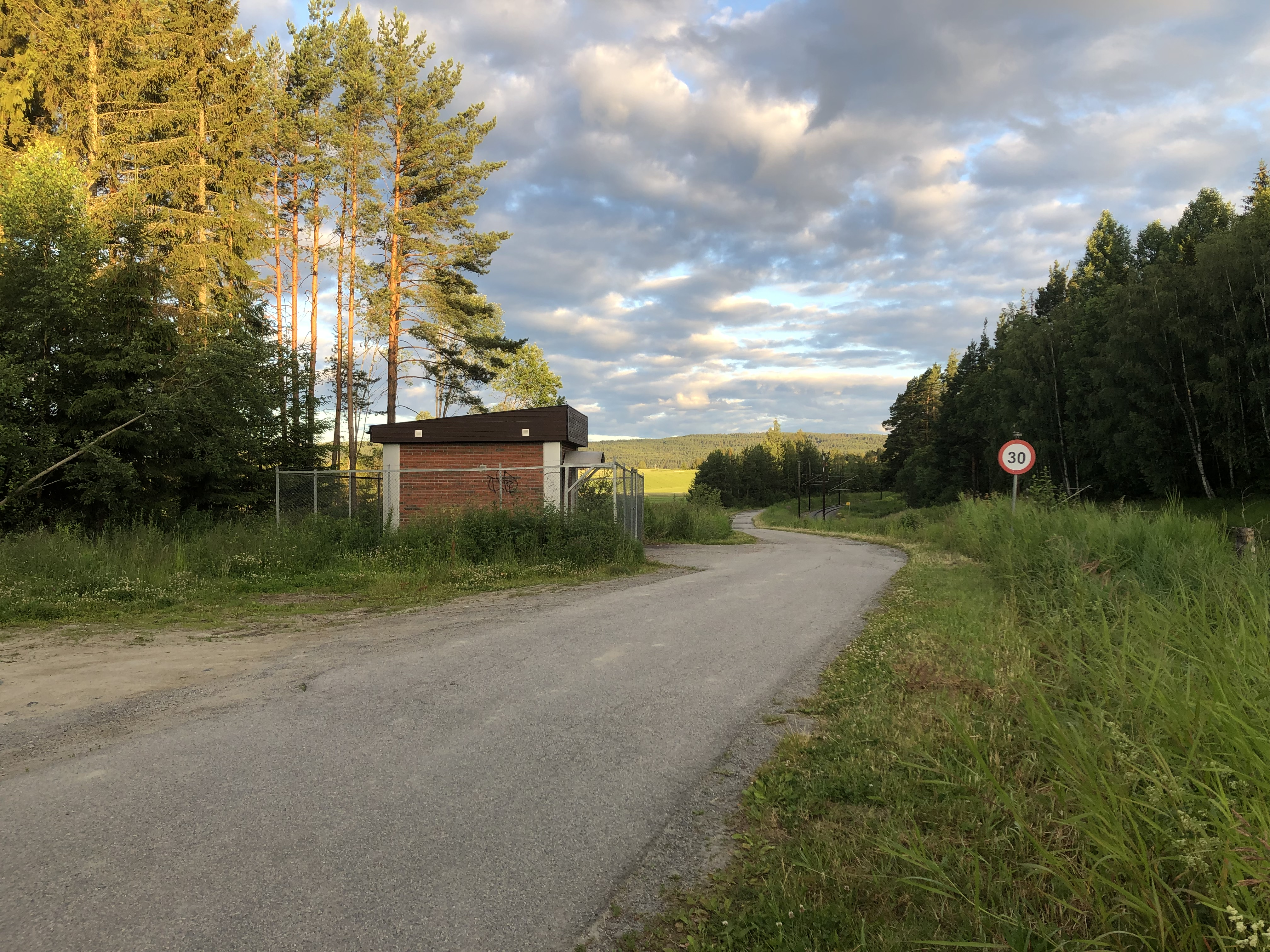 Sørumsgata i Hønefoss.